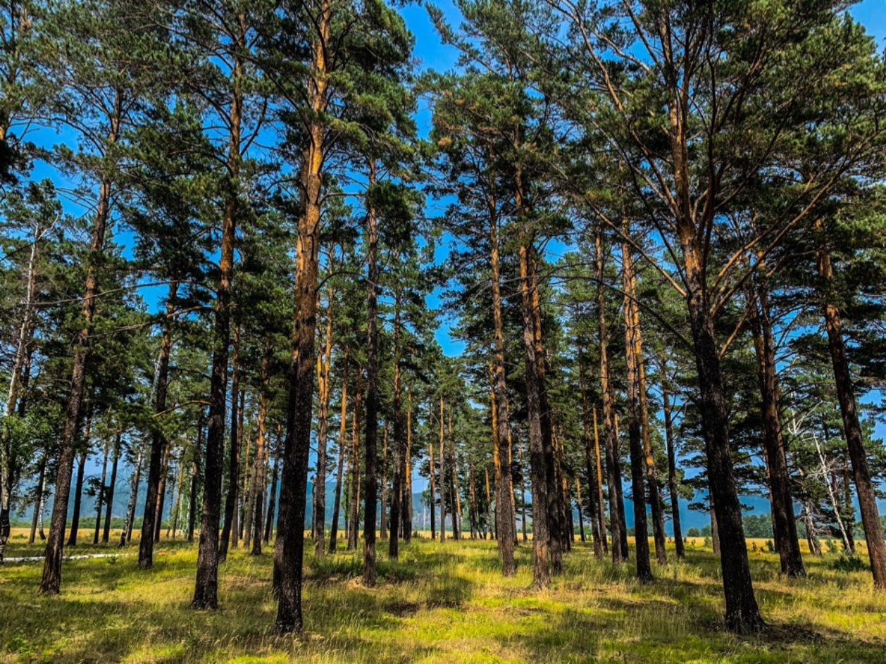 Pine forest. Siberia